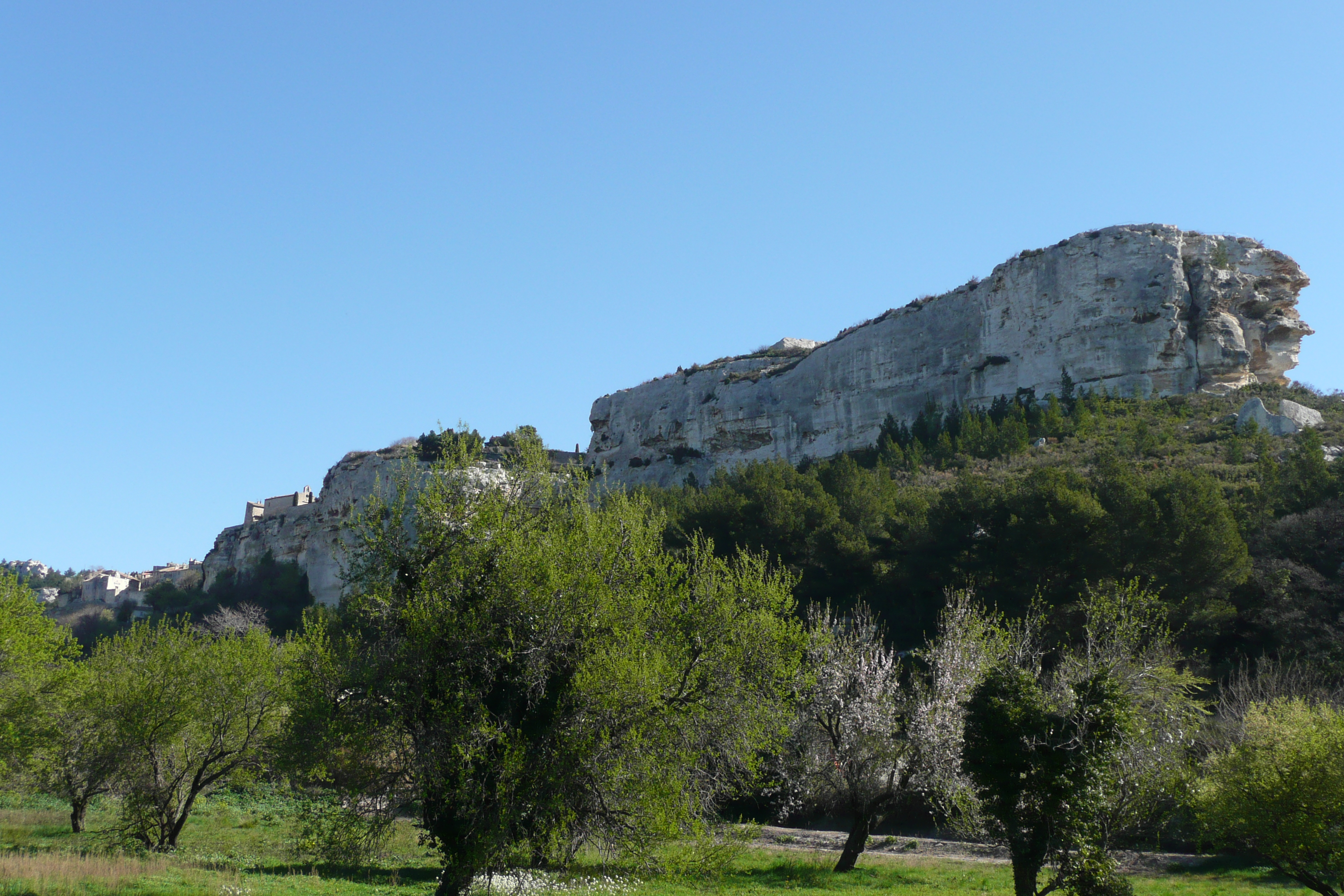 Les Alpilles près des Baux de Provence.